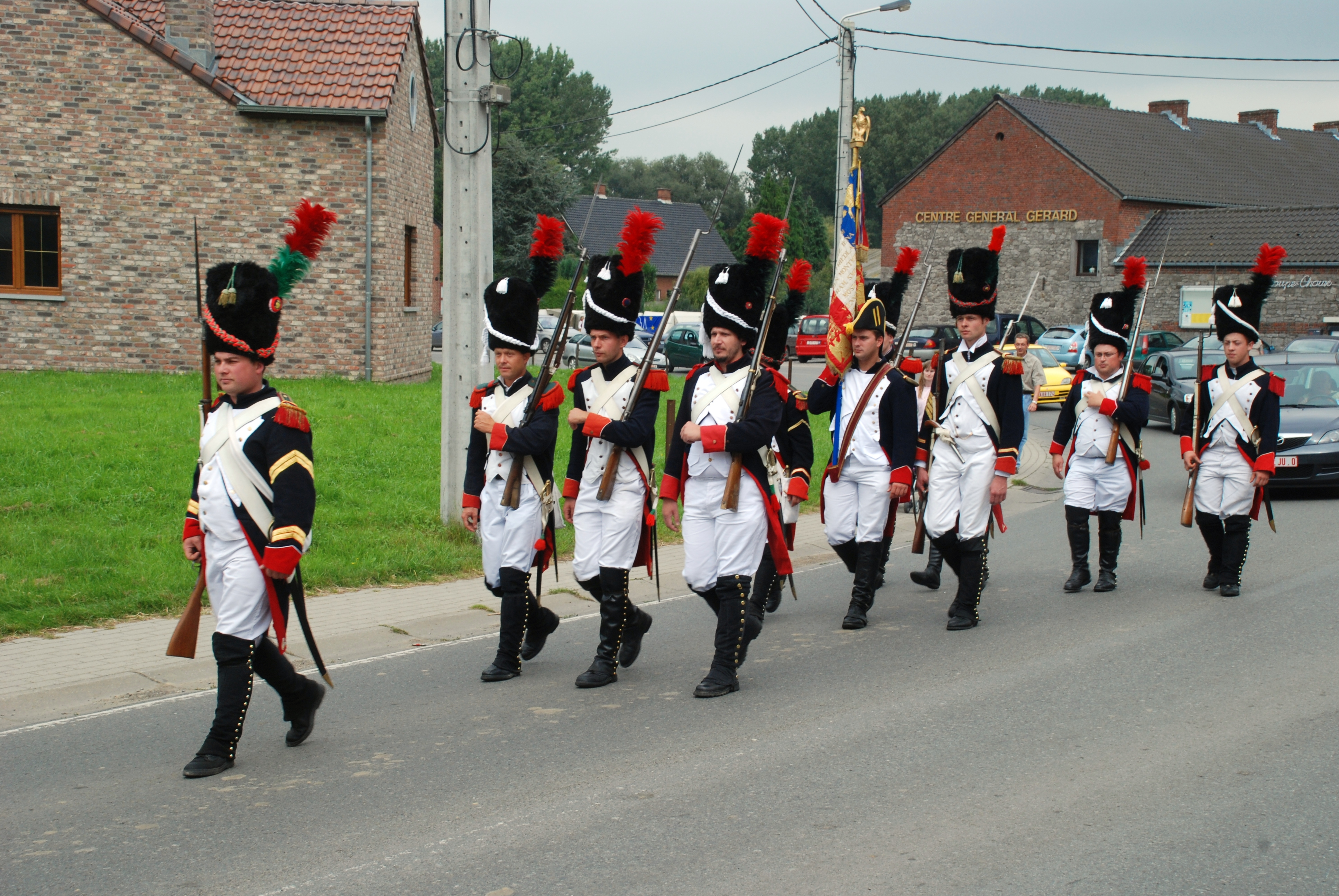 Belgique - Province de Namur - Sombreffe - Ligny - Centre général Gérard - Figurants du 1er régiment de la Garde Impériale quittant le Centre